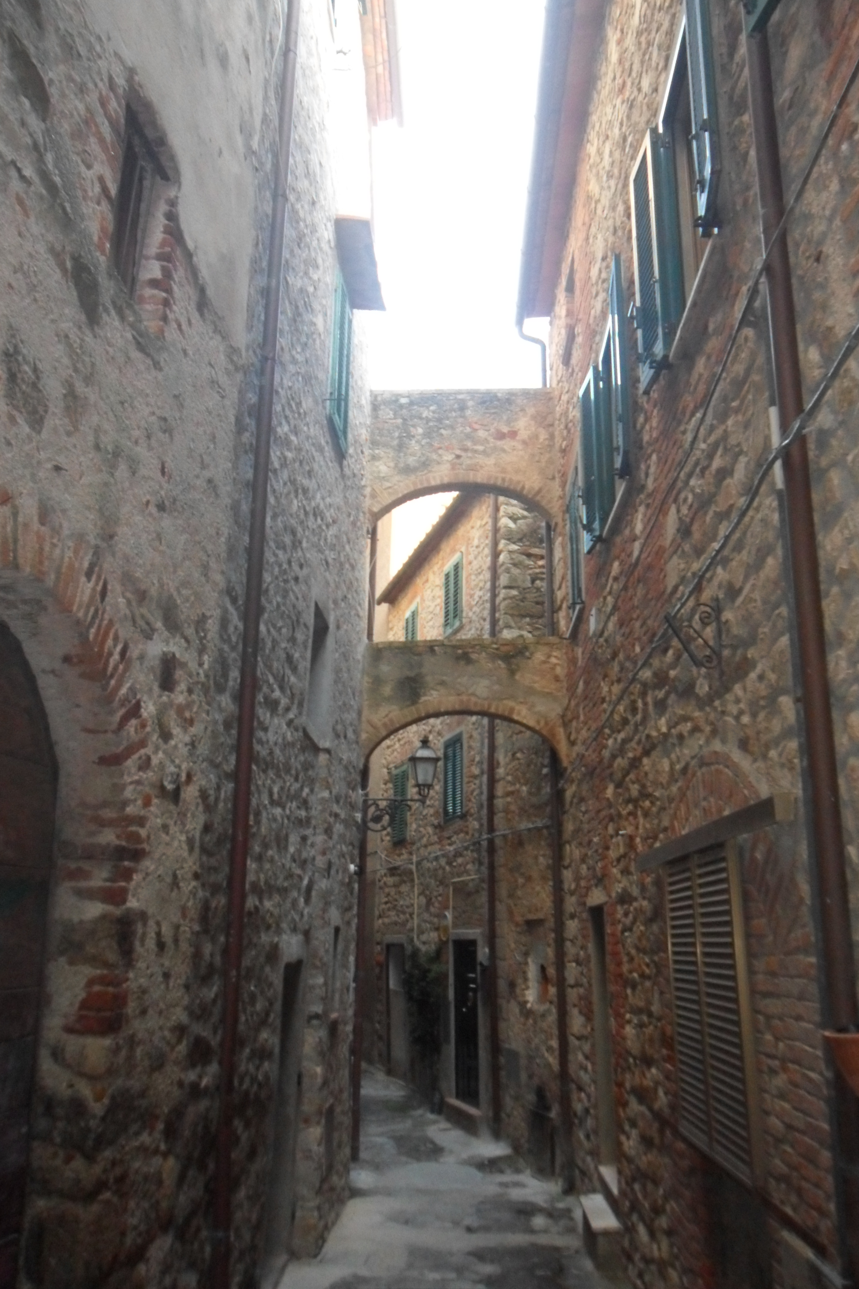 Vicolo stretto di Gavorrano